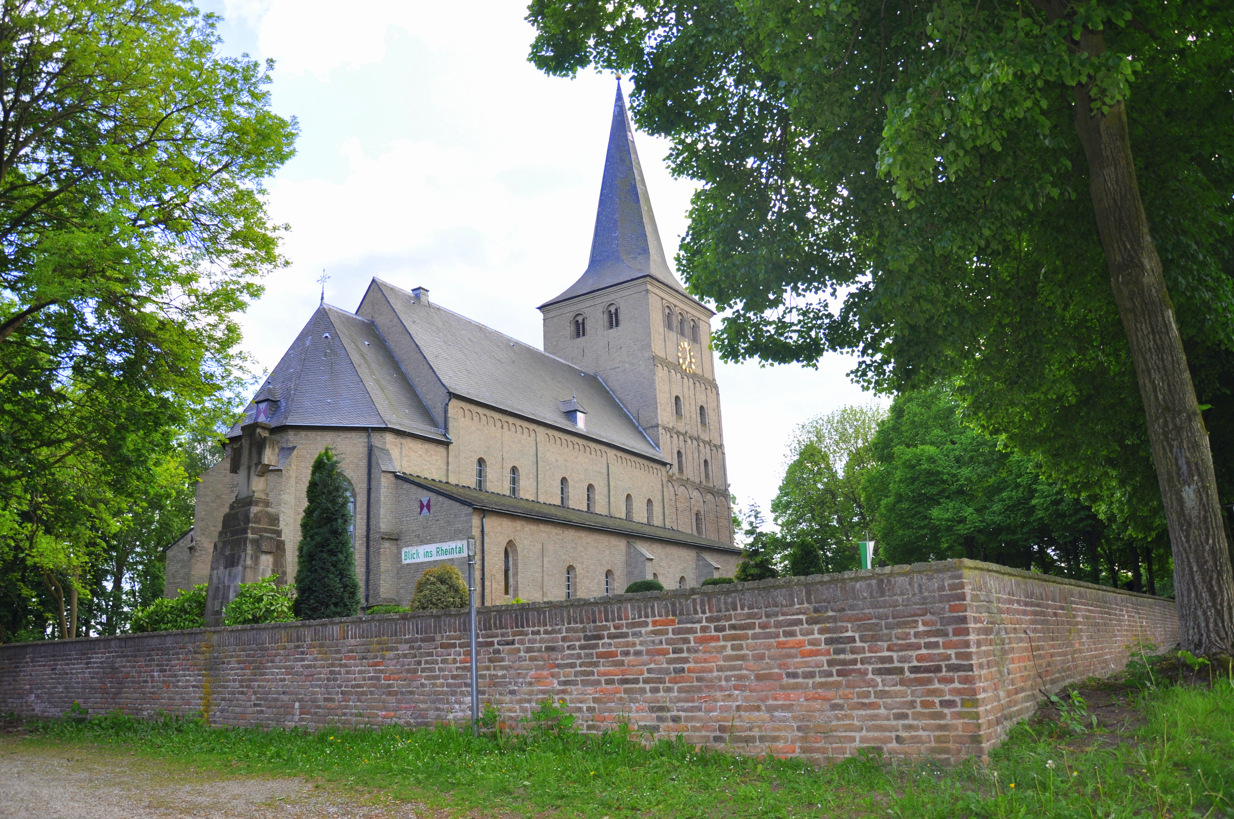 Stiftskirche St. Vitus in Hochelten, Emmerich